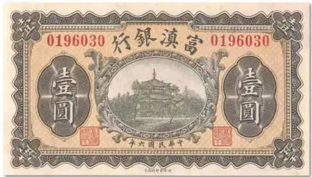 富滇银行民国六年1元券，财政部印刷局印制